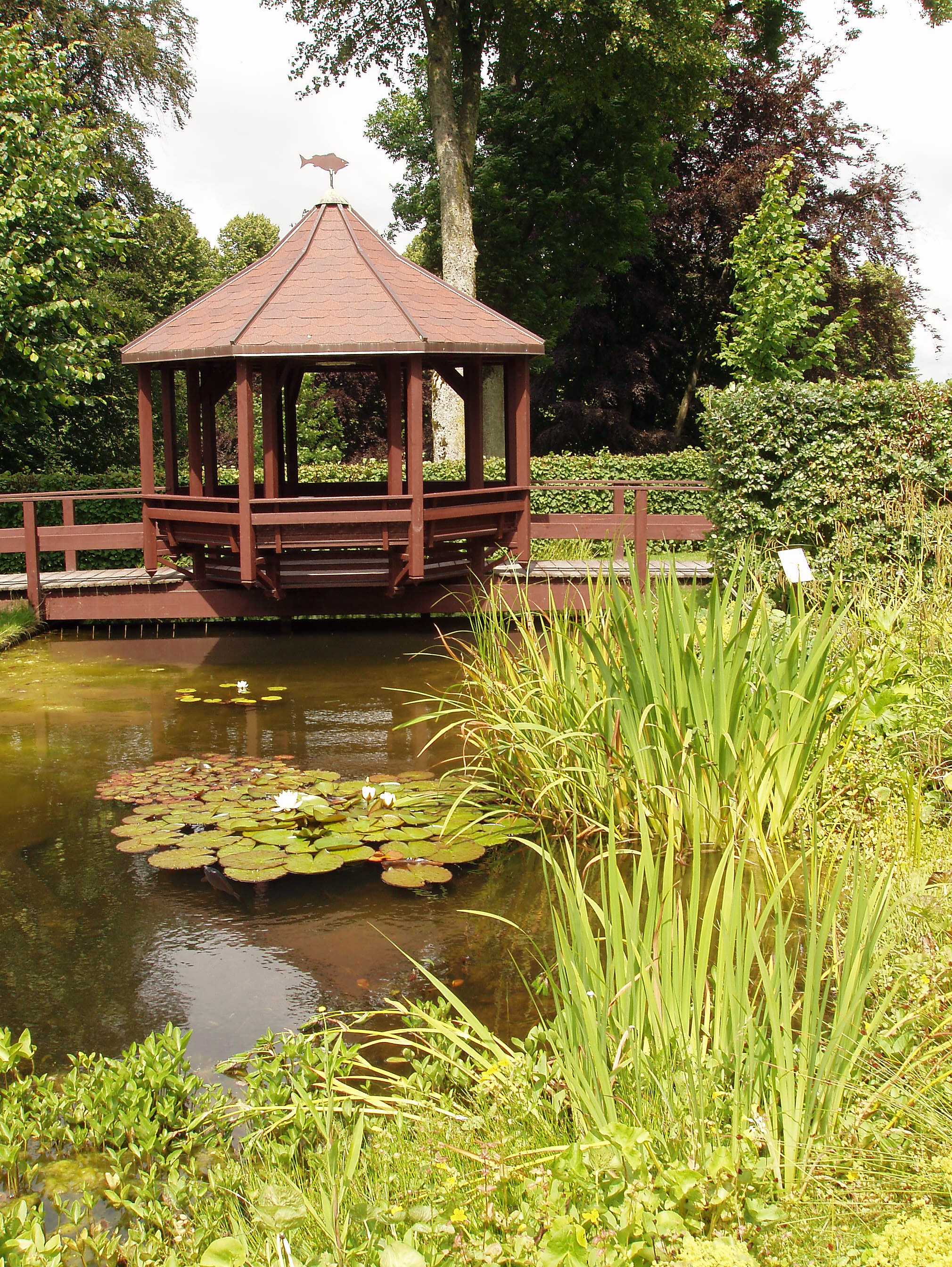 Haveselskabets have ved Clausholm Slot ca. 12 km. sydøst for Randers, Jylland Denmark